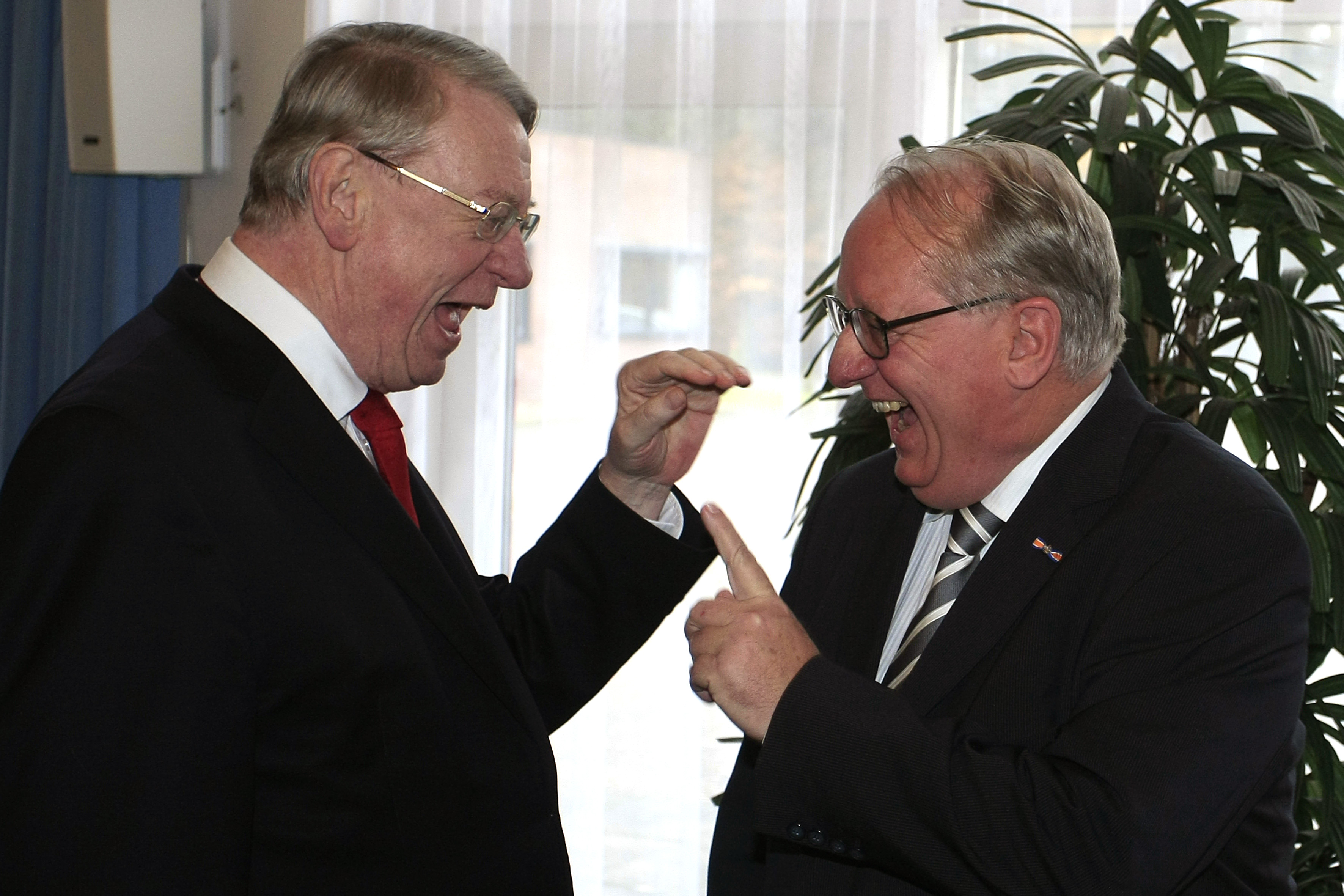 Martin Zijlstra, Nederlands politicus